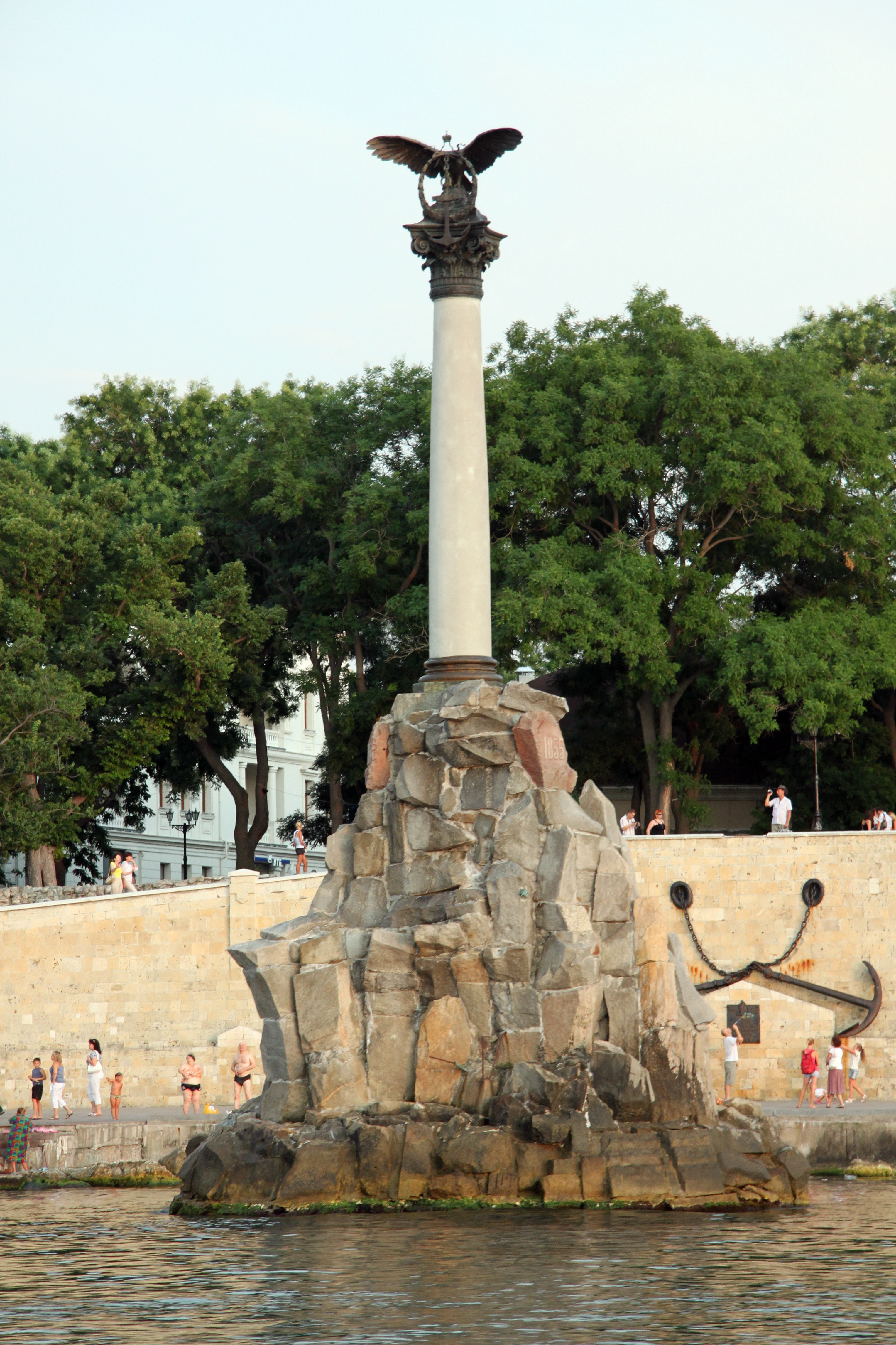 Пам'ятник затопленим кораблям, Севастопольська бухта, Севастополь